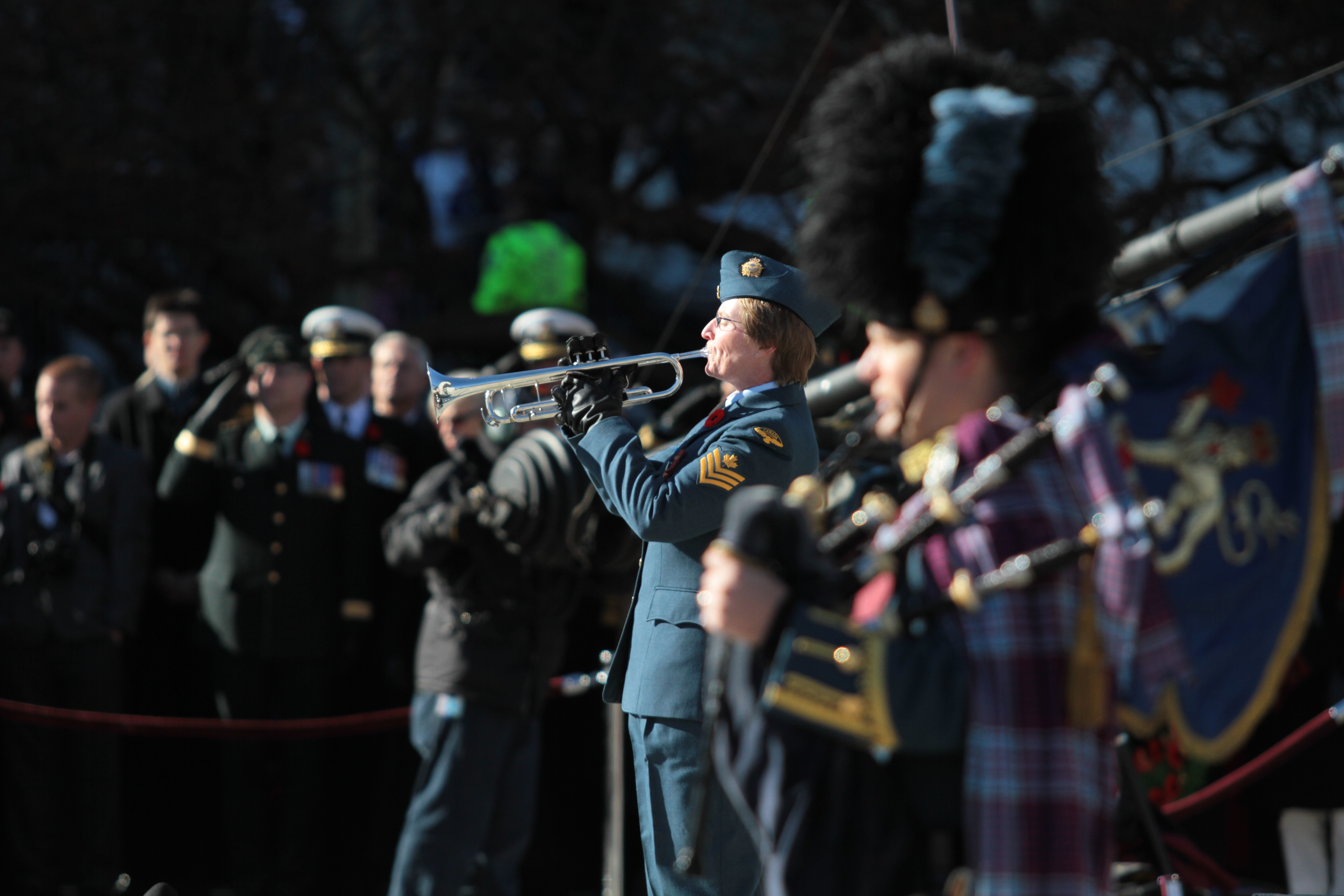 Ottawa | 11/11/10 Photo : Greg Kolz